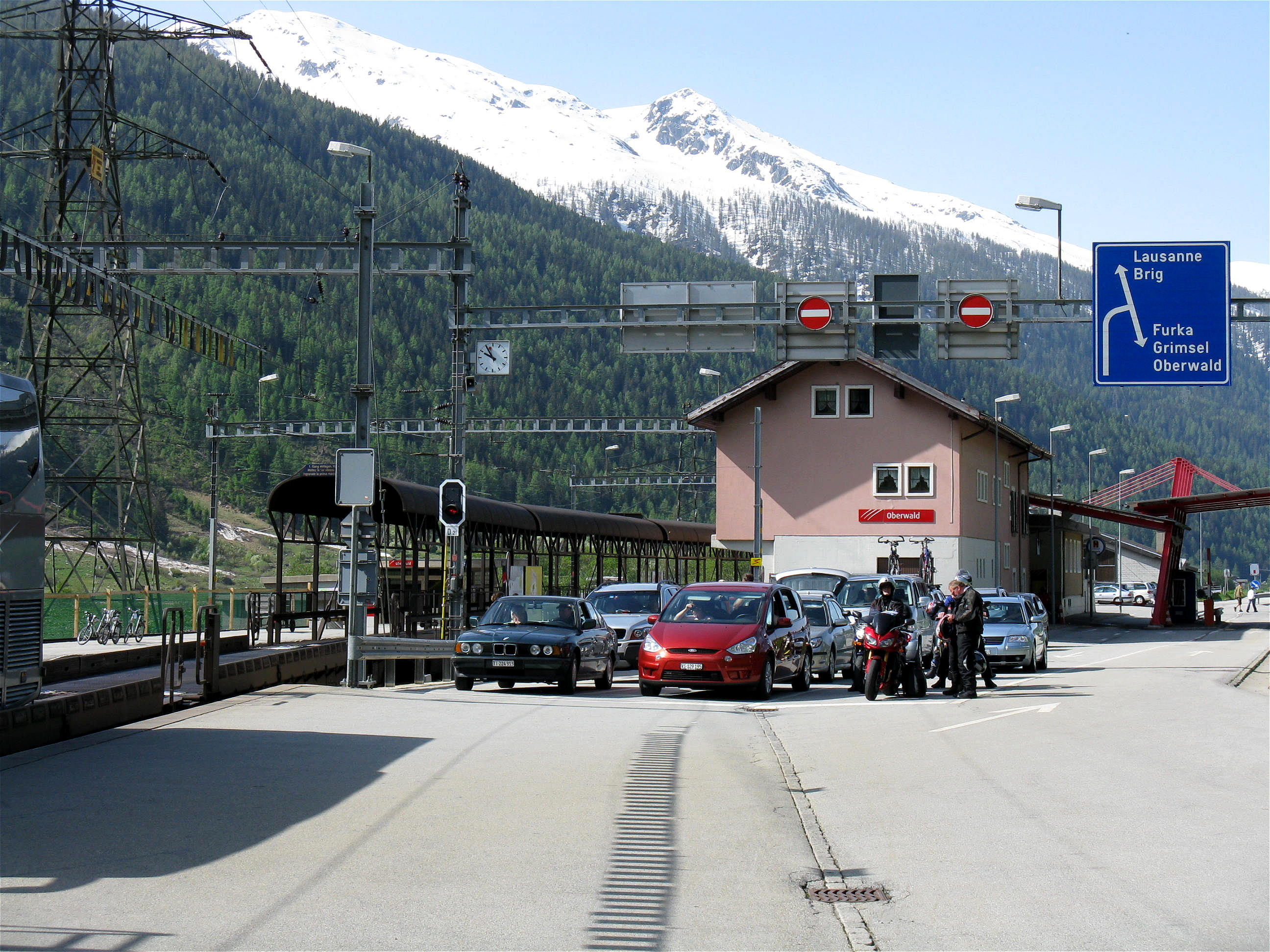 Verladebahnhof Oberwald, Wallis, Schweiz